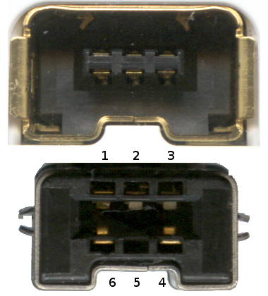 Conectores de un Wiimote y un Nunchuk